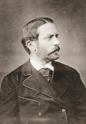 Friedrich Franz Josef von Leitenberger (1837 - 1899), Český a rakouský podnikatel a politik.